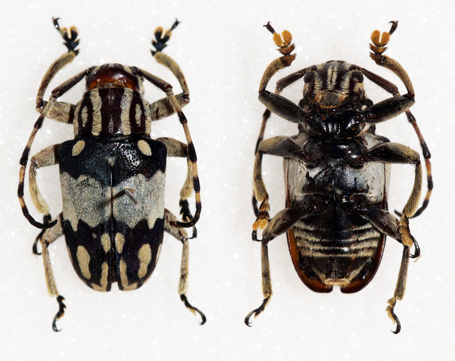 White,1856 Sex: ? Data: 09-2014 - Mt Bawang - West Kalimantan - Borneo Size: 12mm